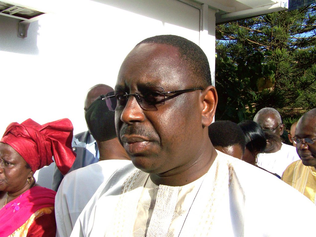 Macky Sall : ancien premier ministre et ancien Président de l'assemblée nationale du sénégal.